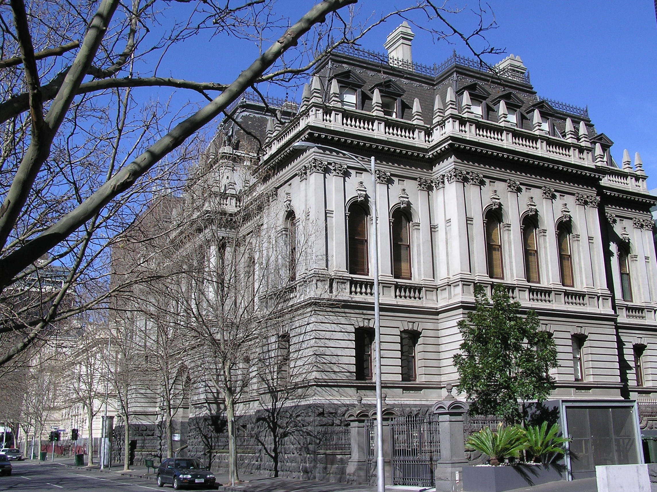 Victoria University v Melbourne, Austrálie